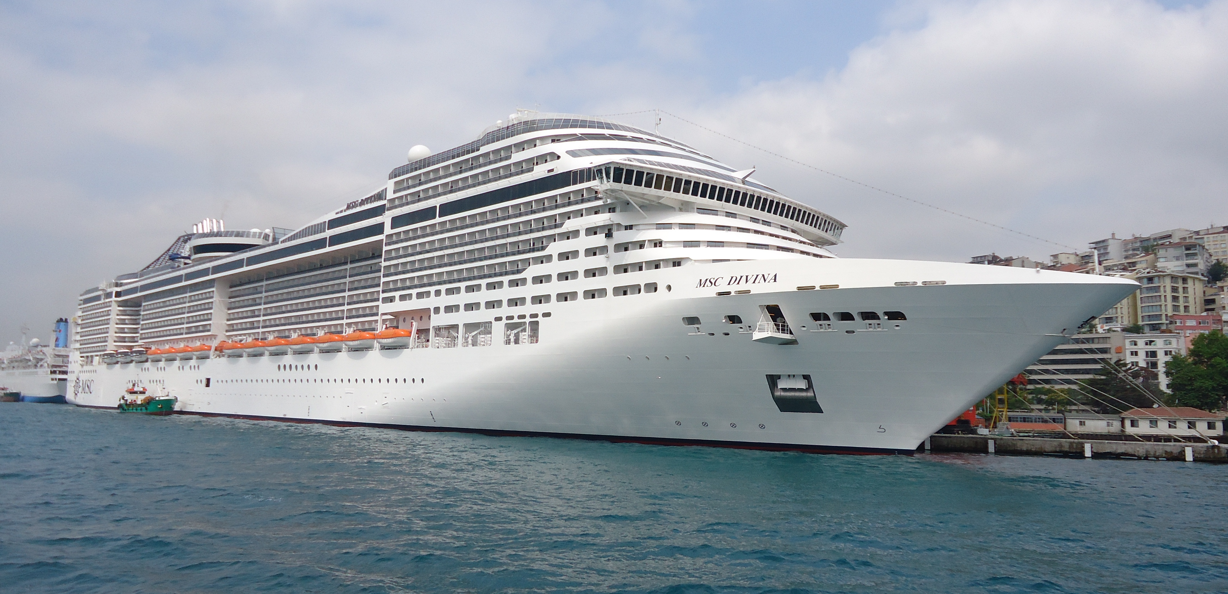 Creuer MSC Divina atracat a Istanbul, Turquia.